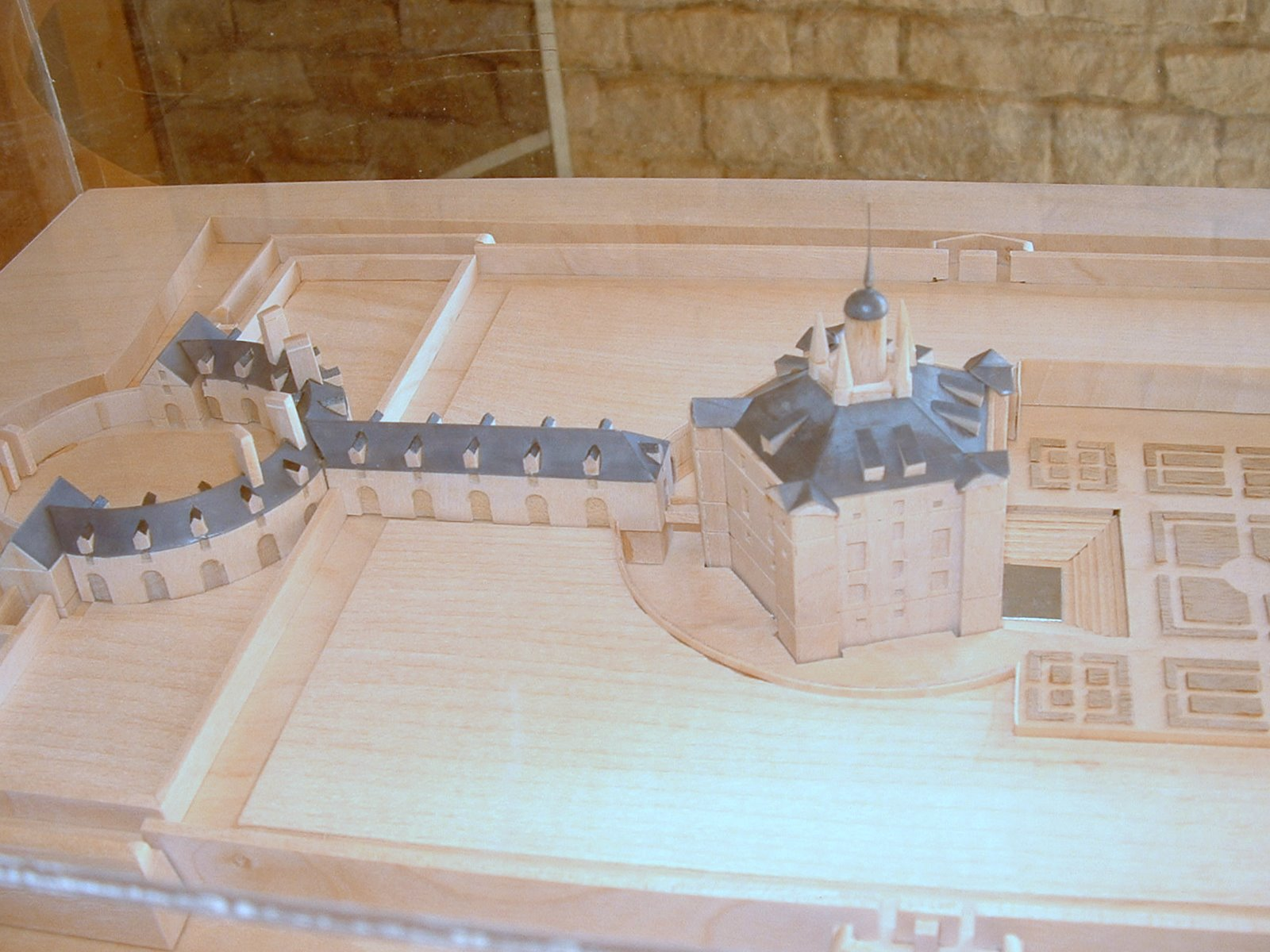 Château de Maulnes, Cruzy-le-Châtel, Yonne - maquette